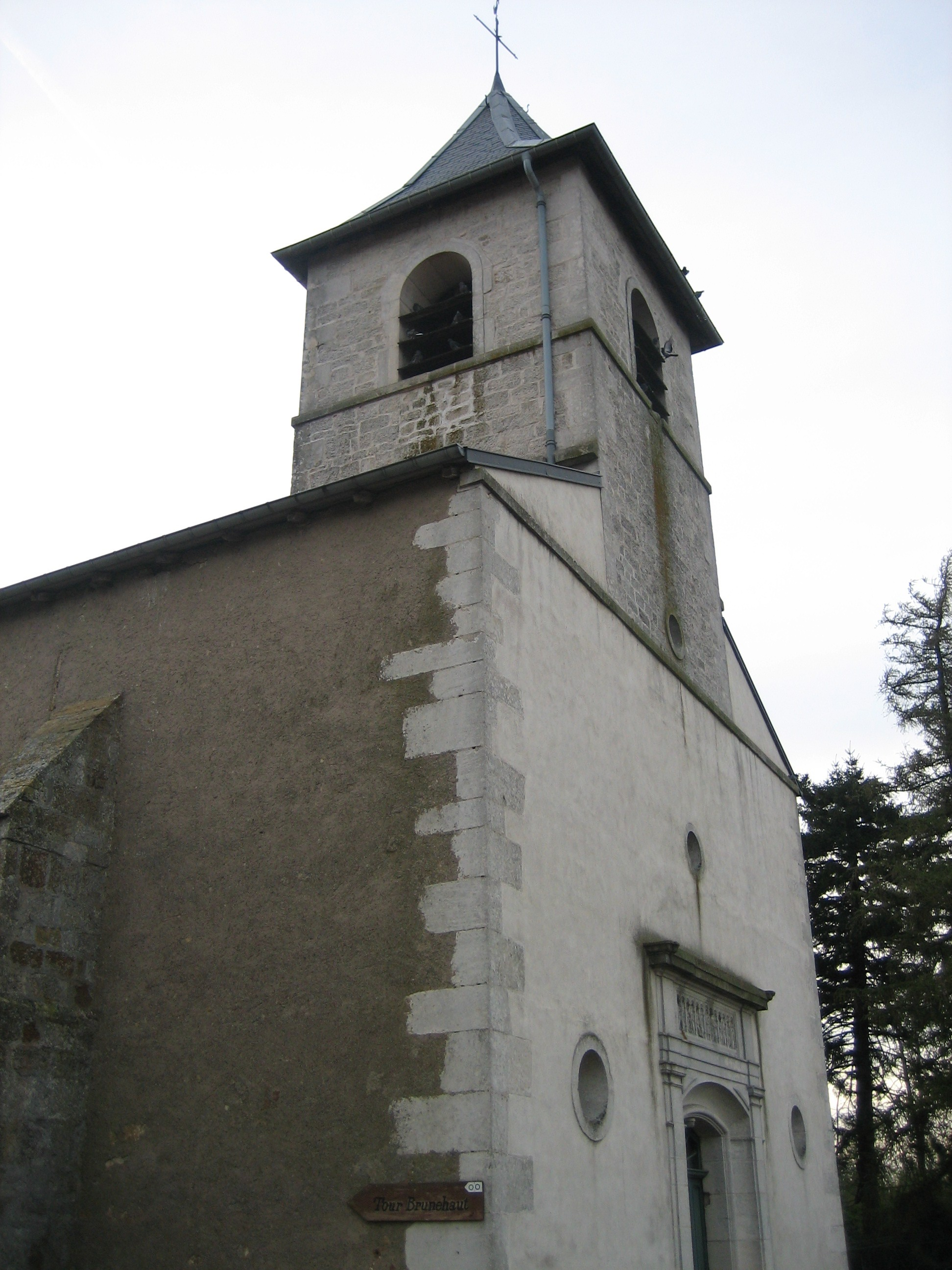 église de Vaudémont par Raphaël Tassin le 31 octobre 2006